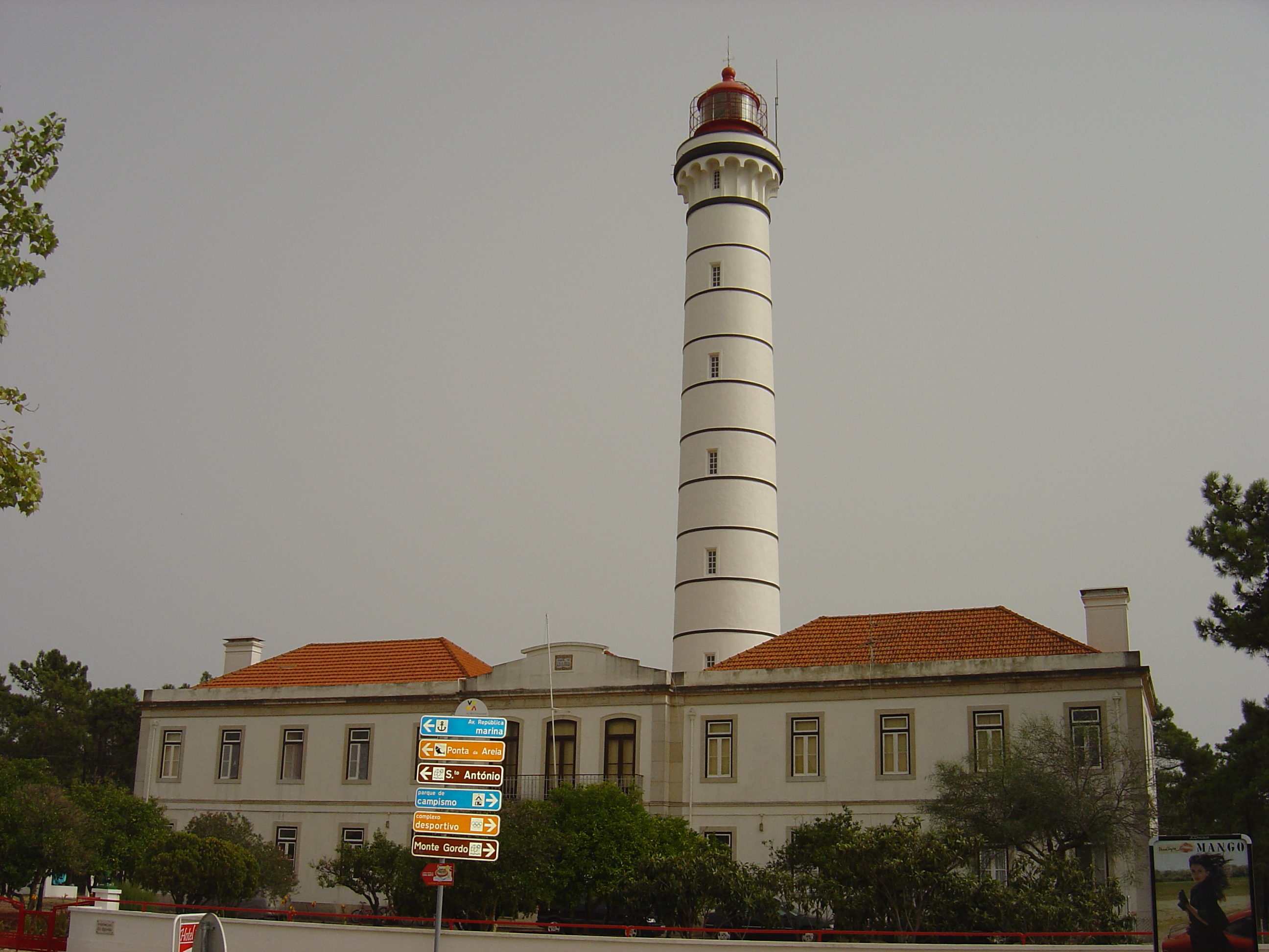 Lighthouse, Vila Real de Santo António